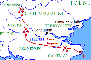 Seconde expédition de César en Bretagne (Détail de la carte de la Gaule en 54 av. J.-C.)